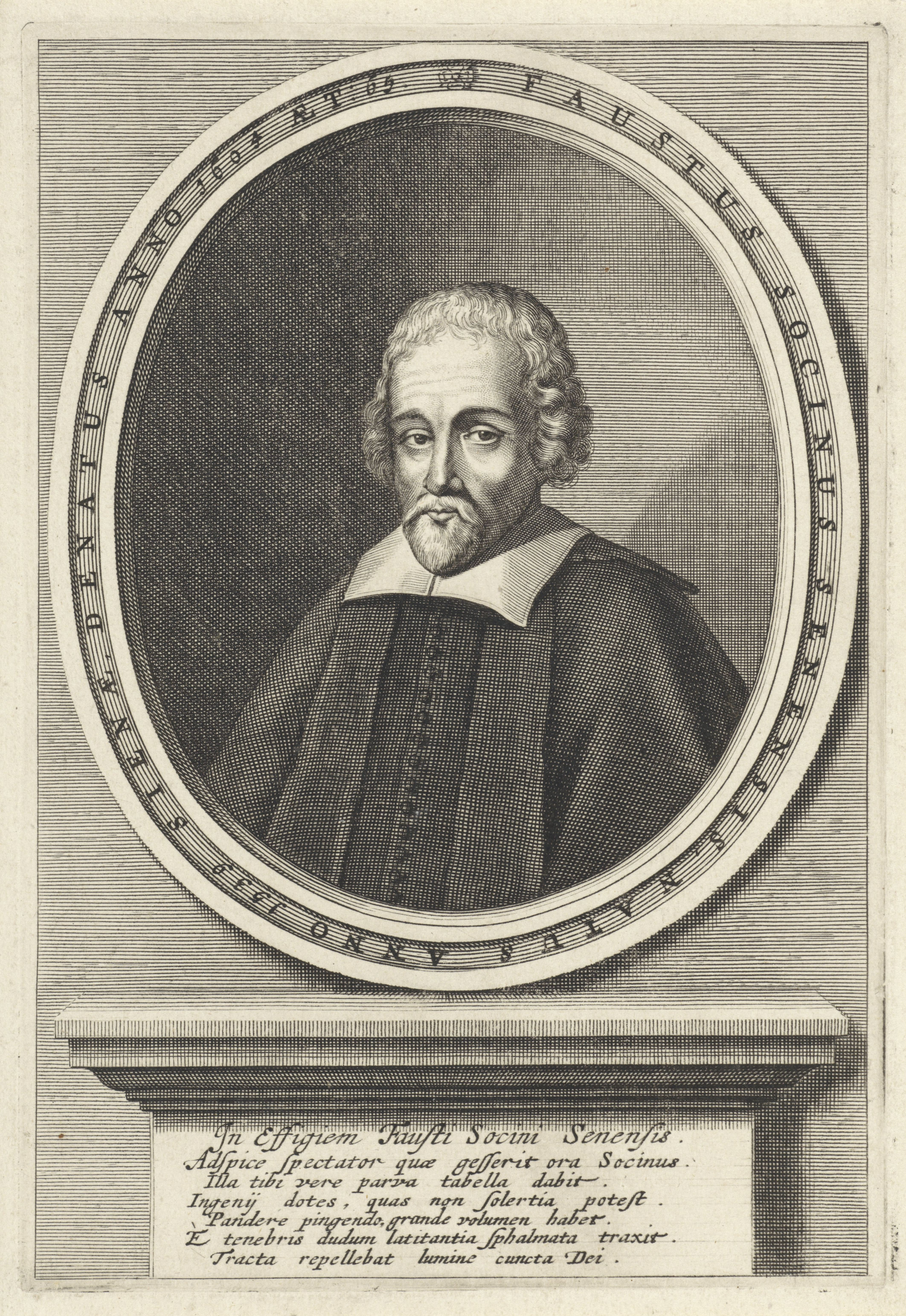 IdentificatieTitel(s): Portret van de theoloog Fausto Paolo SozziniObjecttype: prent Objectnummer: RP-P-1908-3942Catalogusreferentie: Hollstein Dutch 27Opschriften / Merken: verzamelaarsmerk, verso, gestempeld: Lugt 2228VervaardigingVervaardiger: prentmaker: Lambert Visscher (toegeschreven aan)Plaats vervaardiging: Noordelijke Nederlanden (mogelijk)Datering: 1643 - 1691Fysieke kenmerken: gravureMateriaal: papier Techniek: graveren (drukprocedé)Afmetingen: plaatrand: h 224 mm × b 155 mmOnderwerpWie: Fausto Paolo SozziniVerwerving en rechtenVerwerving: aankoop 1905Copyright: Publiek domein